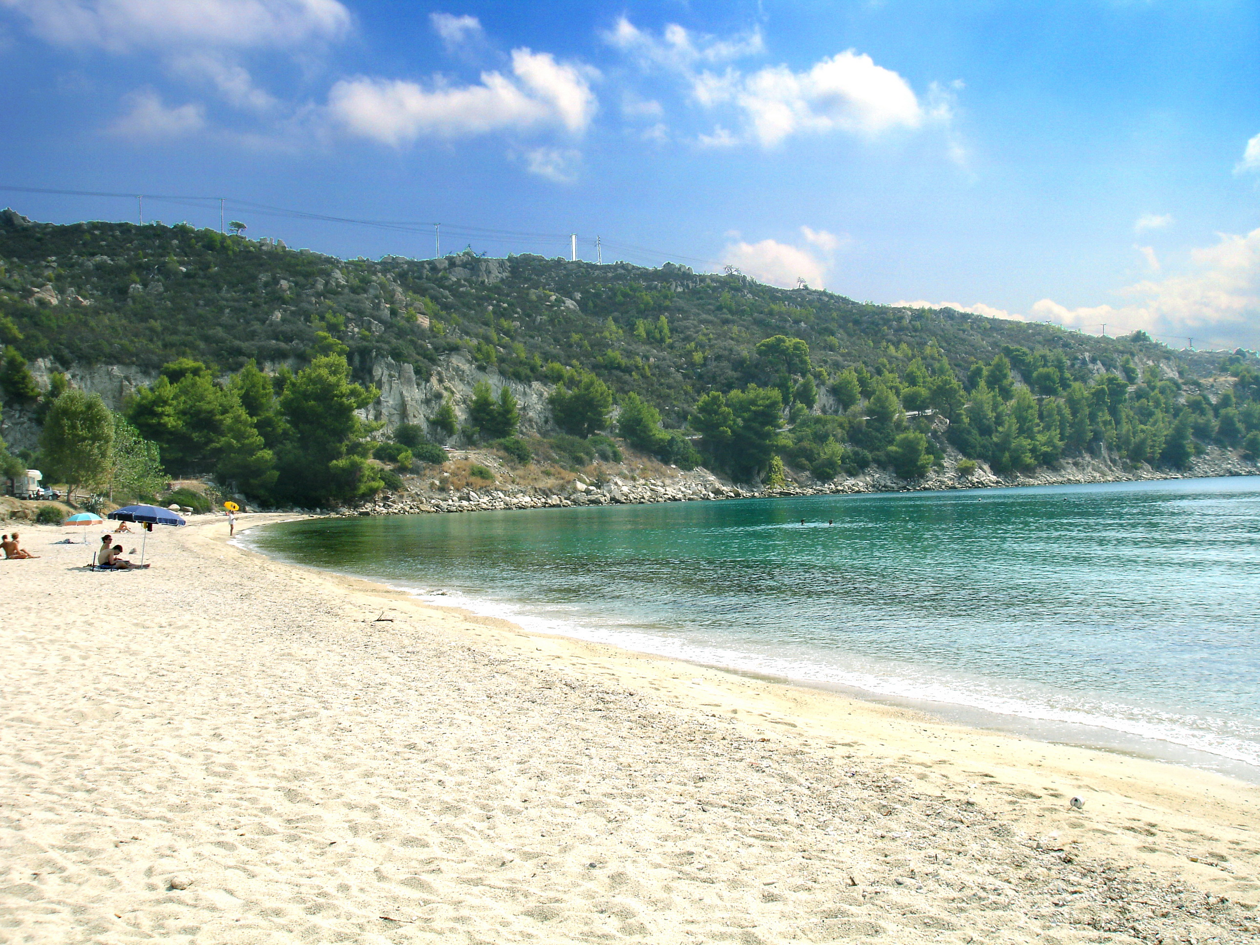 Chalkidiki - Nikiti, Agios Ioannis